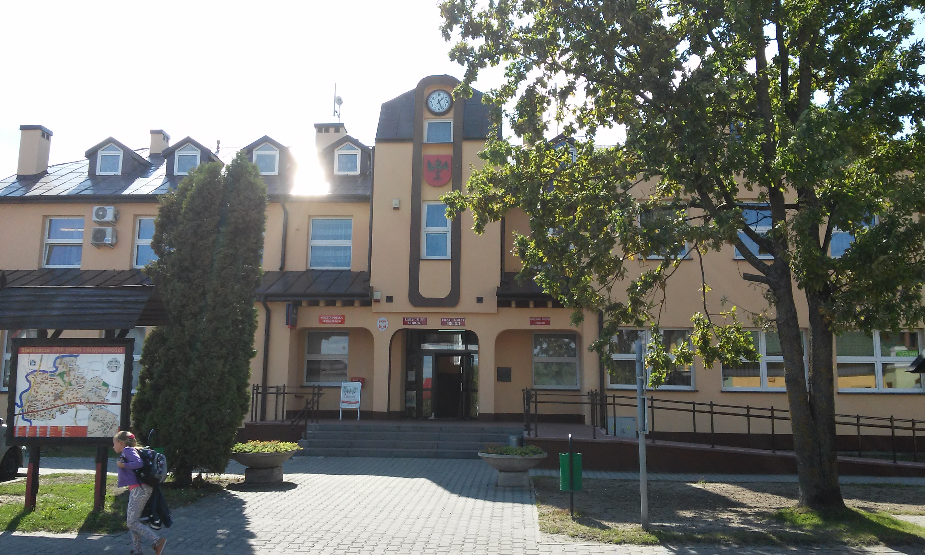 Urząd Gminy Siedliszcze